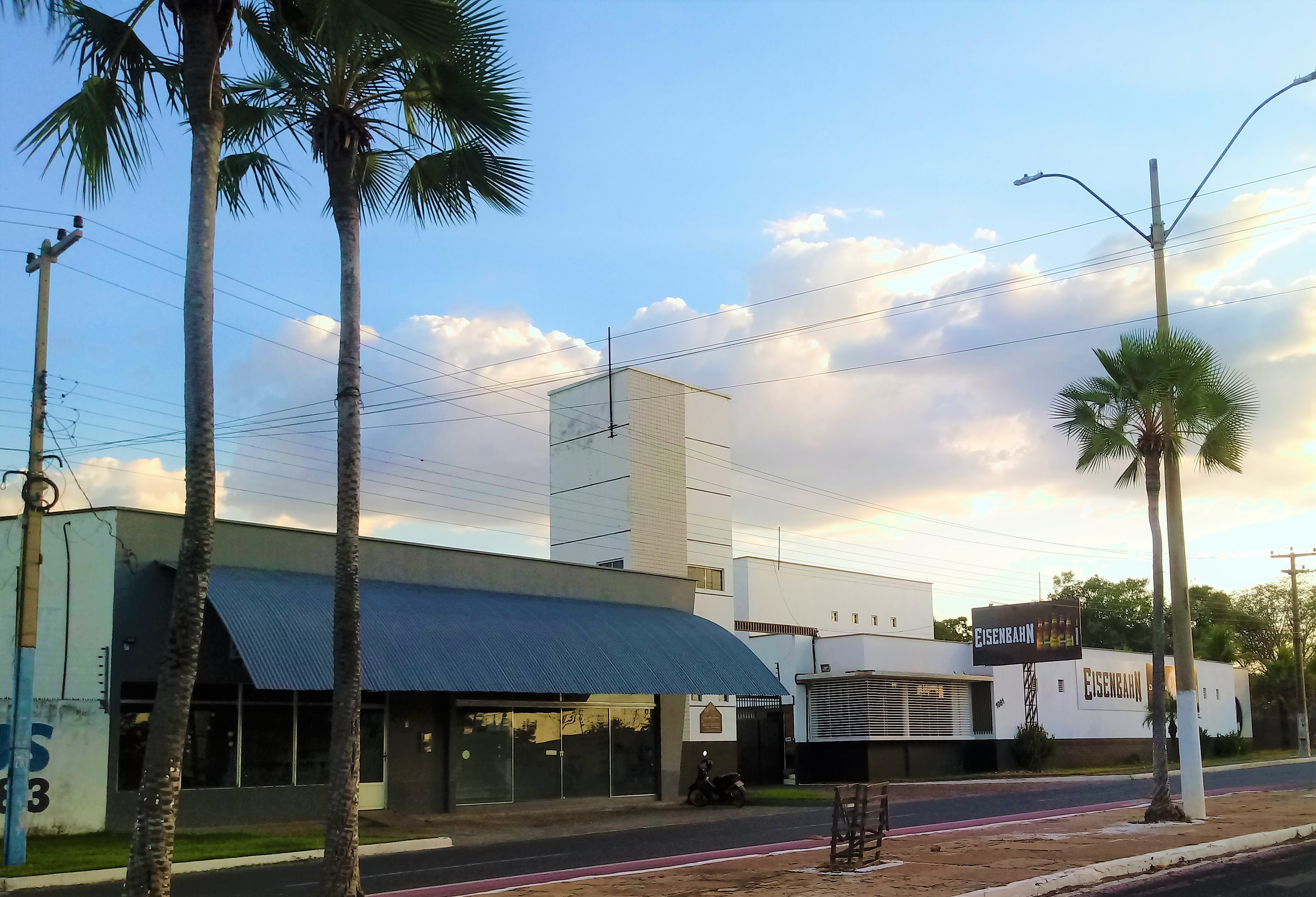 Distribuidor da Eisenbahn na avenida Santo Antonio, em Campo Maior.